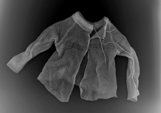 Věra Stuchelová´s photographs